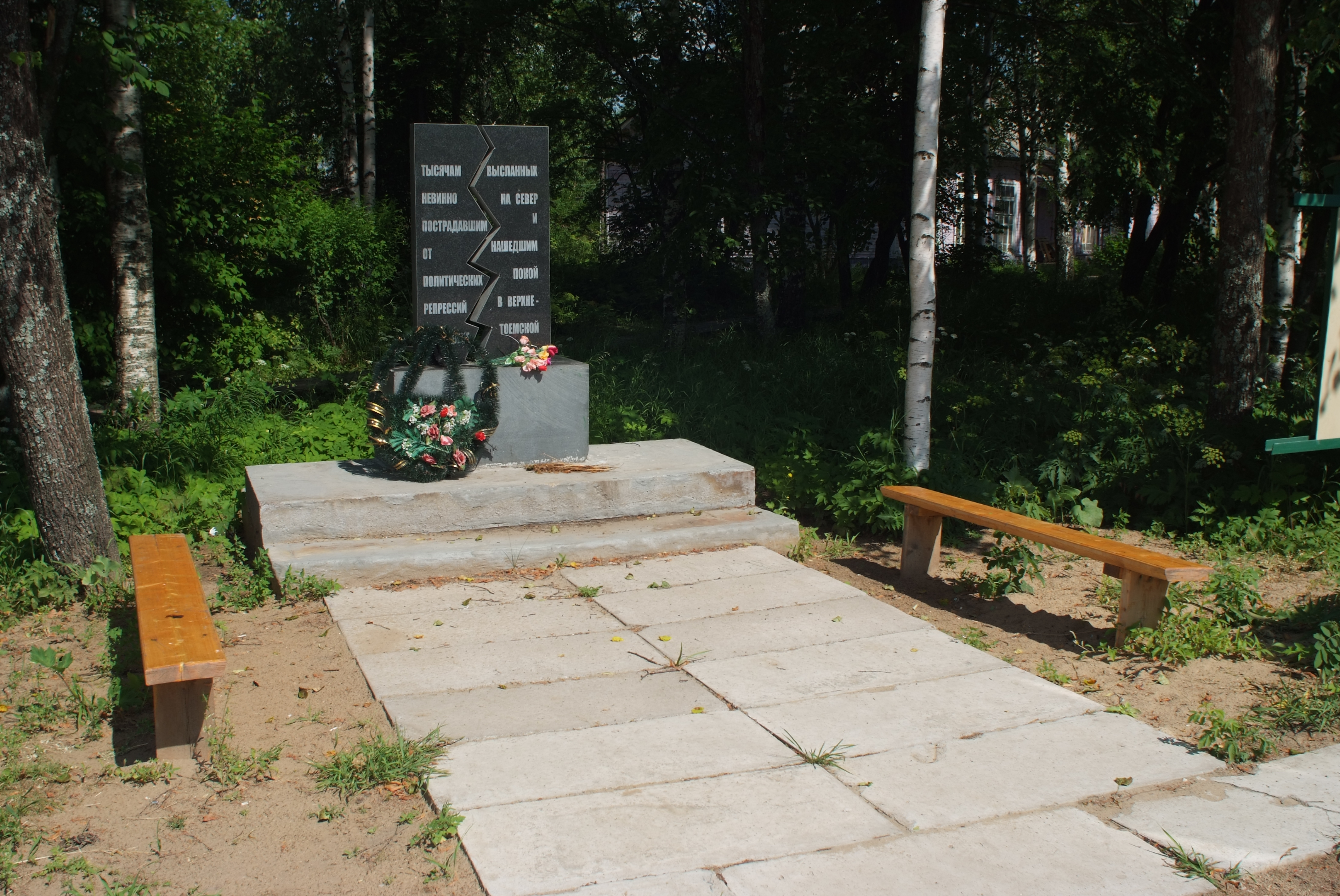 Верхняя Тойма. Памятник пострадавшим от политических реперессий